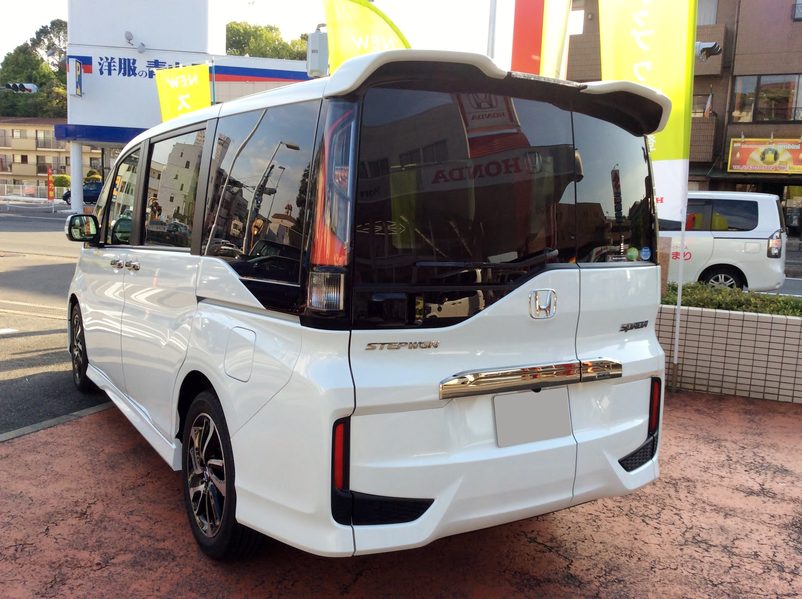 RP3型ホンダ・ステップワゴンスパーダクールスピリットをリアから撮影。